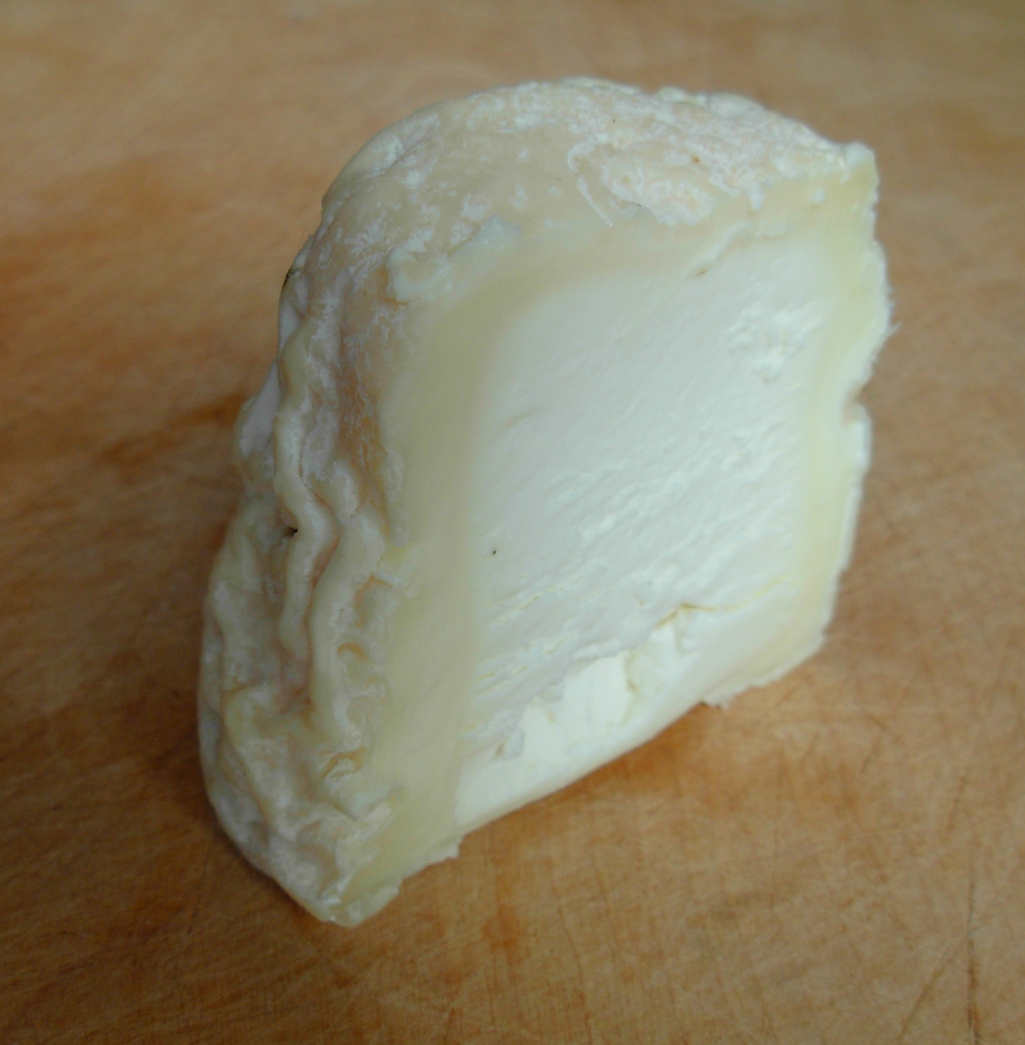 Chèvre cheese